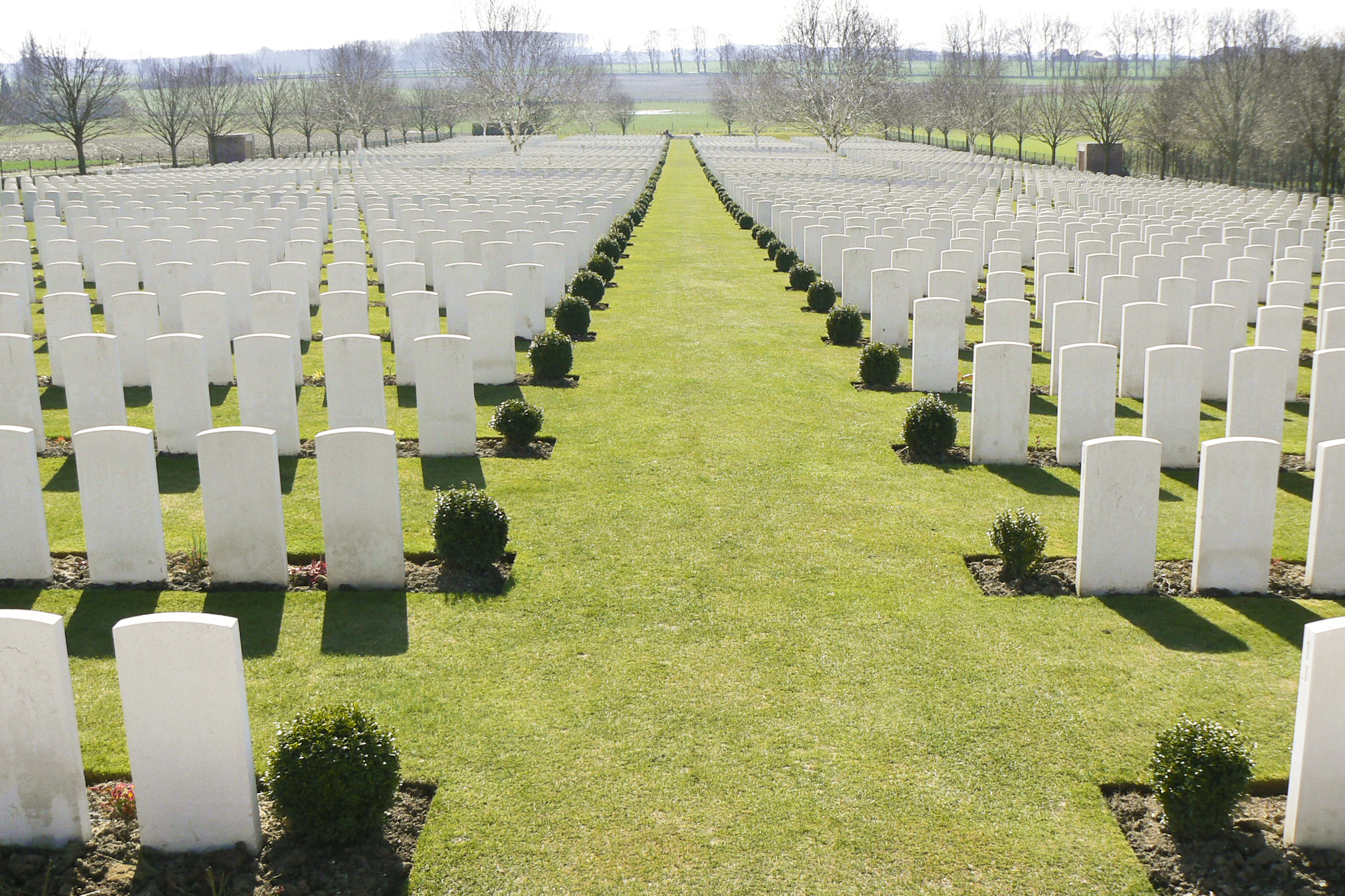 Hooge Crater Cemetery. Overzicht.